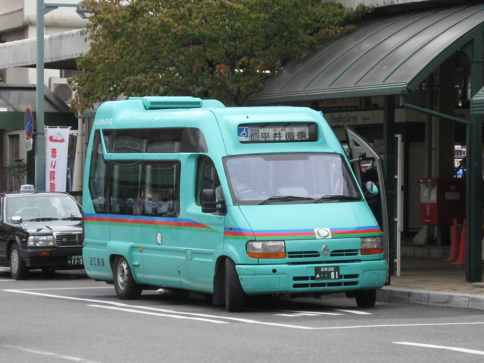 OHMI Railway Bus 0081 (Shiga 200 a 0081)